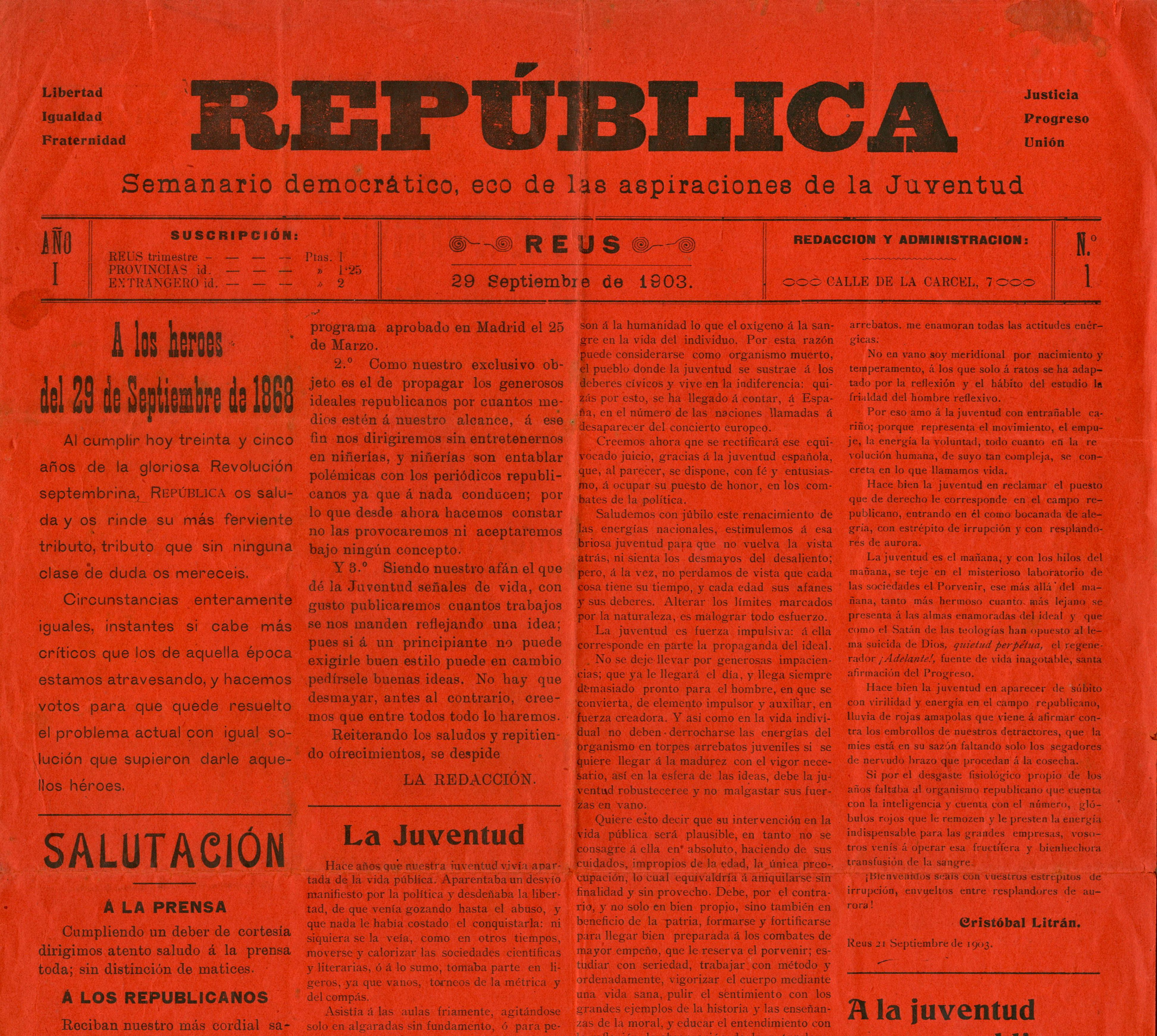 Primera pàgina del núm. 1 de La República